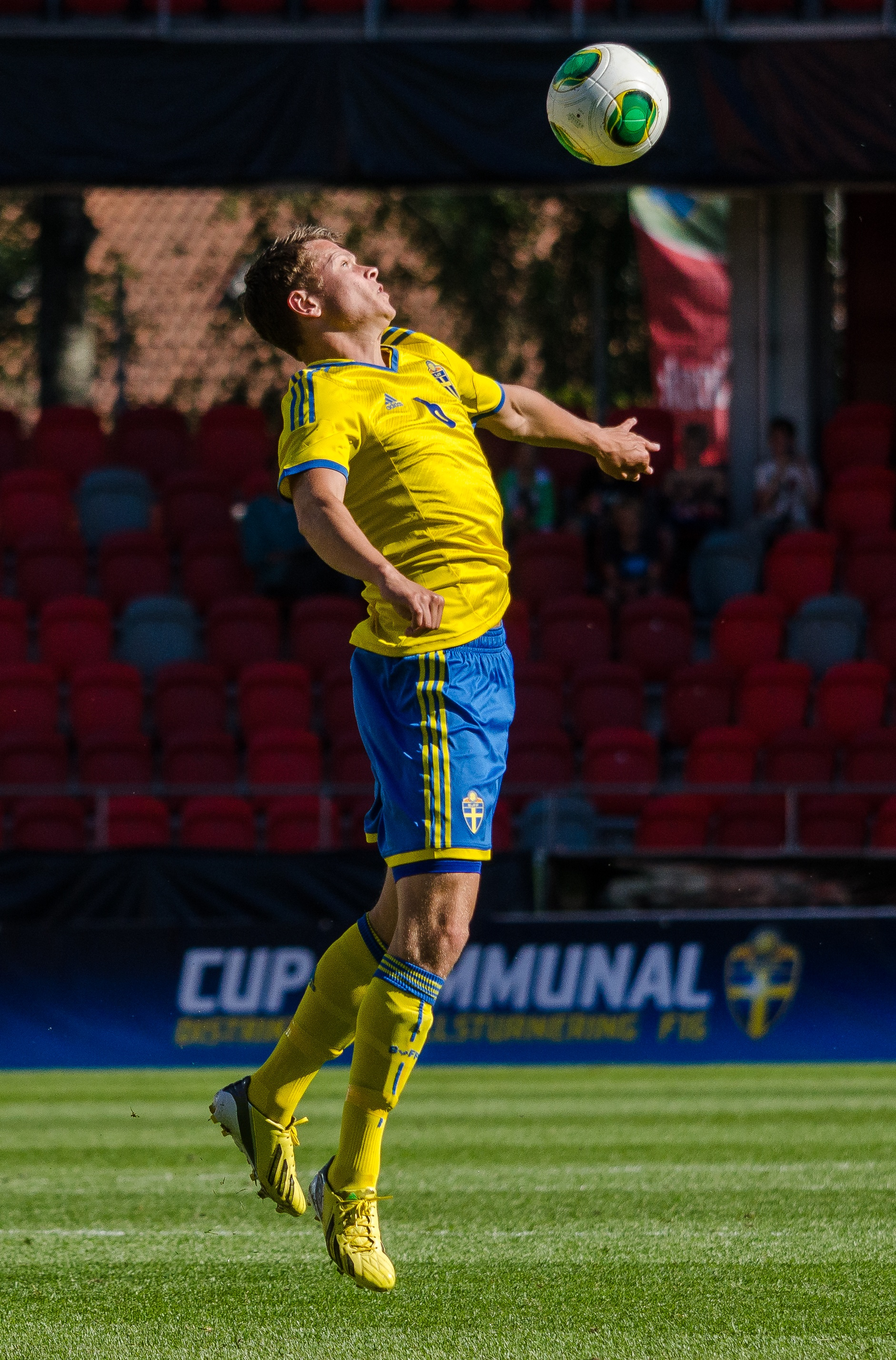 Mittfältaren Viktor Claesson i det svenska U21-landslagets 3-2 seger mot Schweiz i en träninglandskamp på Myresjöhus Arena i Växjö, 6/6 2013.